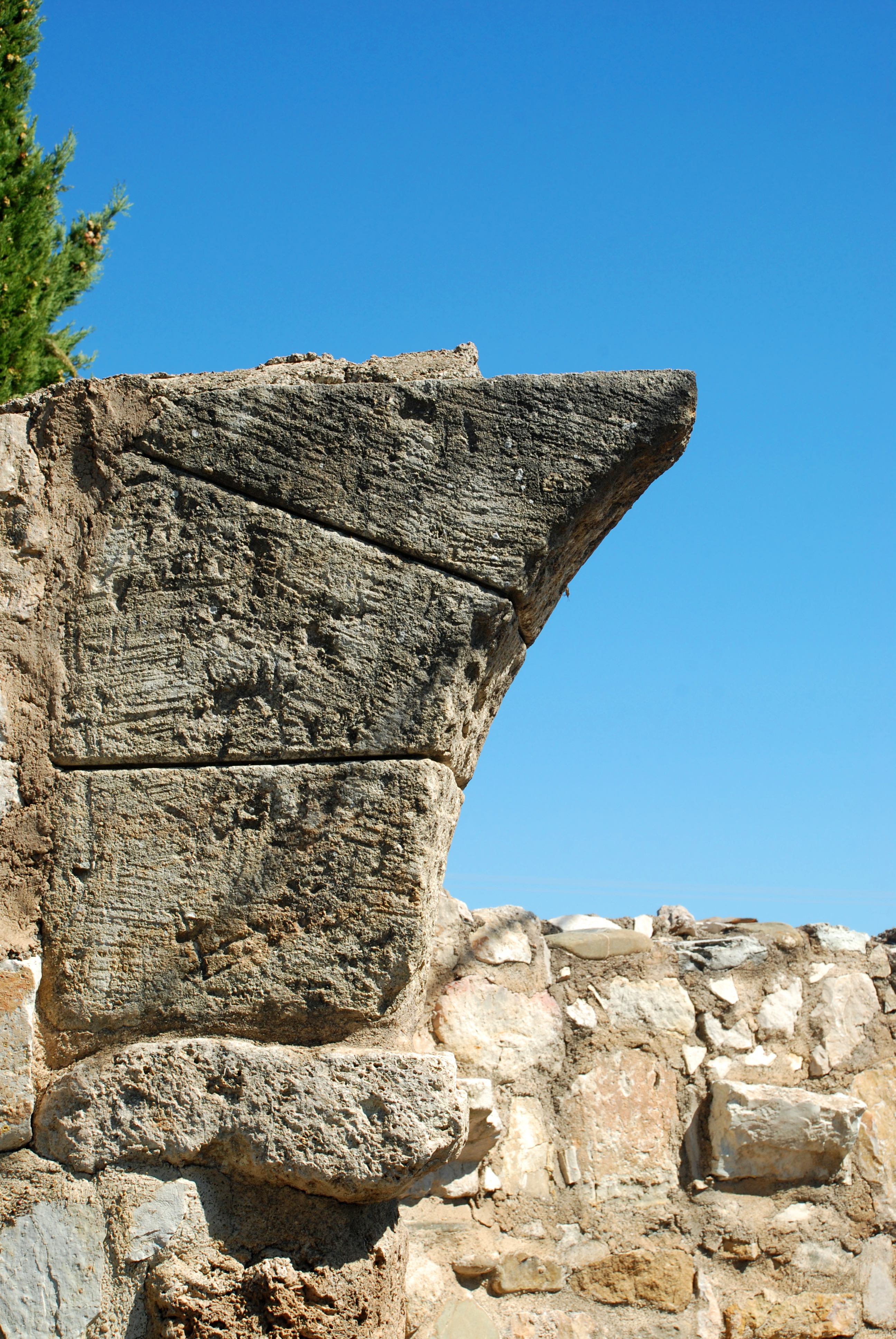 France - Languedoc - Hérault - Cessenon-sur-Orb - Chapelle Sainte-Anne